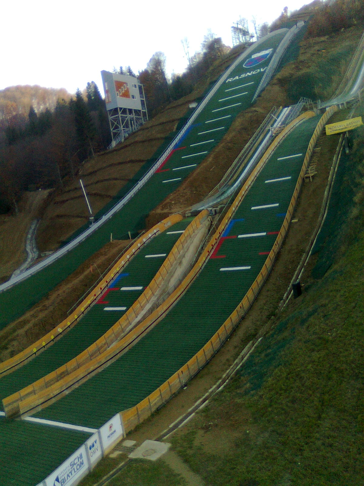 Trambulinele Valea Carbunarii RASNOV